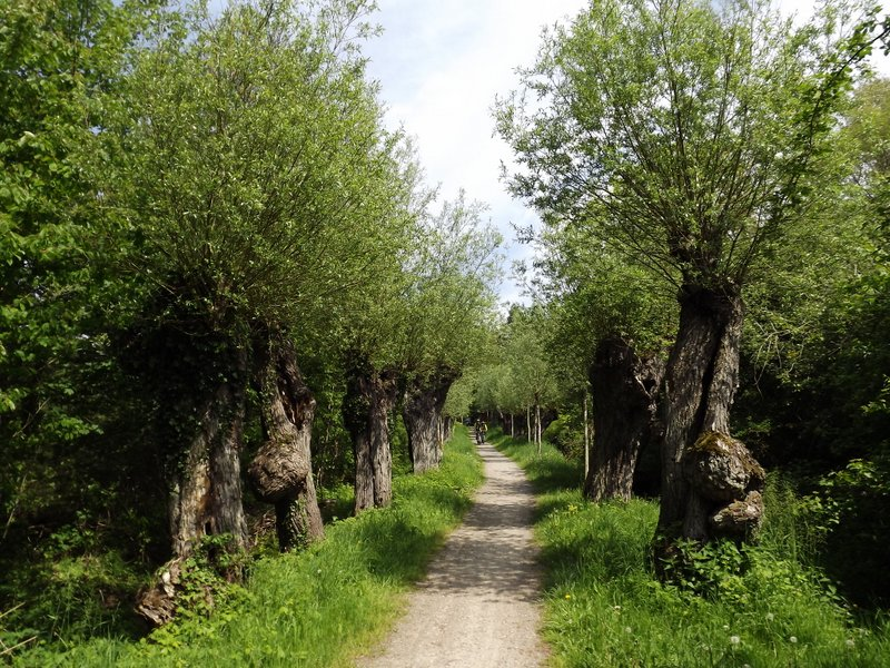 Naturschutzgebiet Goor-Muglitz auf Rügen, in den Freetzer Wiesen, die Kopfweidenallee